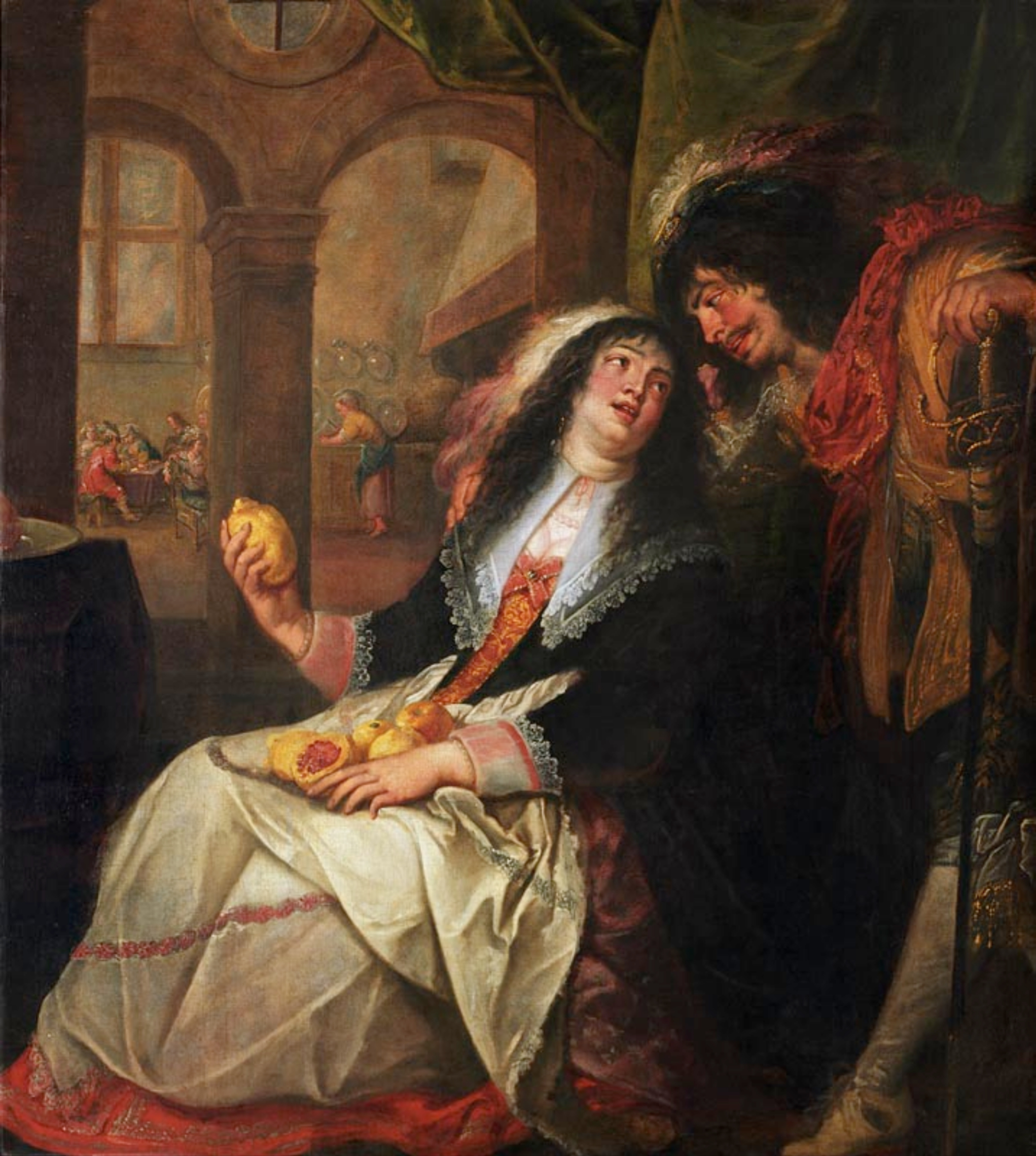 Galant scene